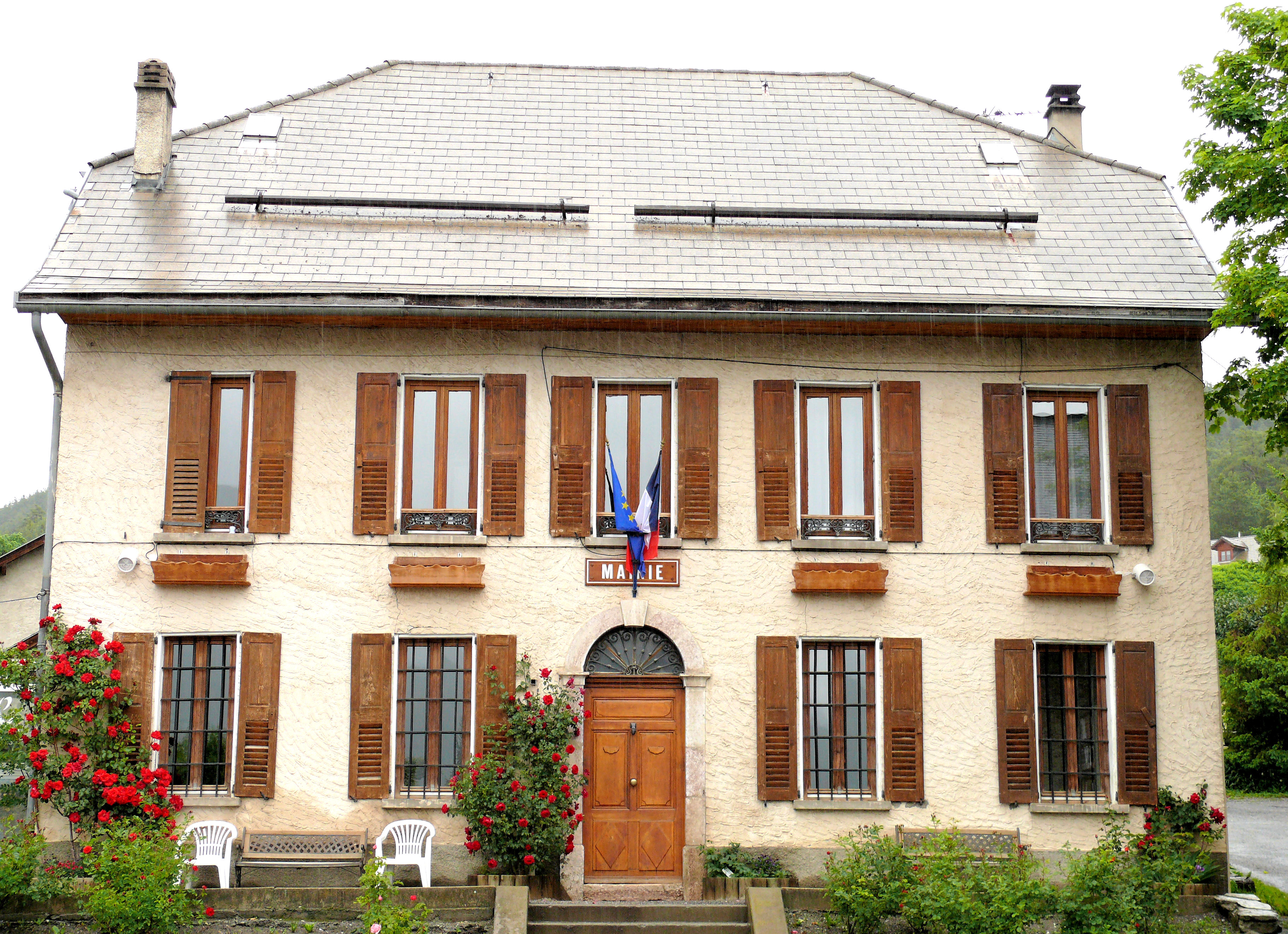 Saint-Pons (Alpes-de-Haute-Provence) - Mairie